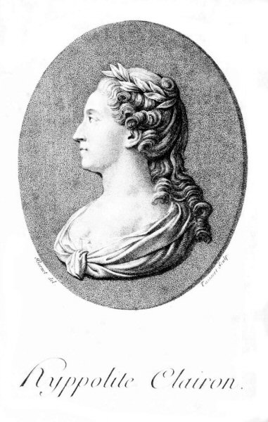 Portrait de Mademoiselle Clairon, frontispice des Mémoires d'Hyppolite Clairon (Paris 1799).